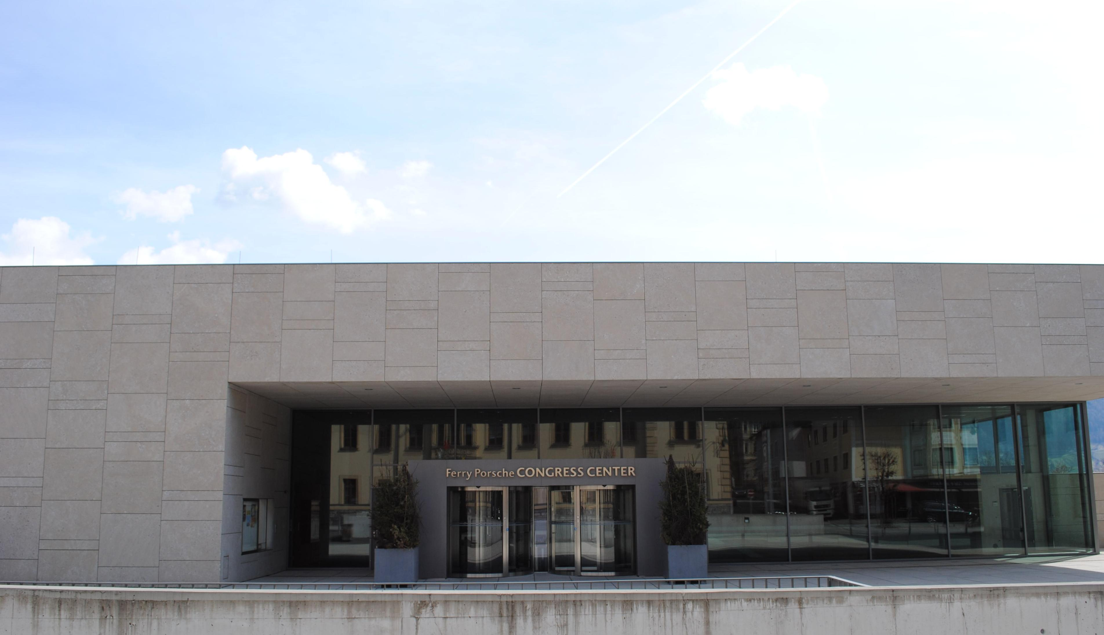 FPCC Zell am See